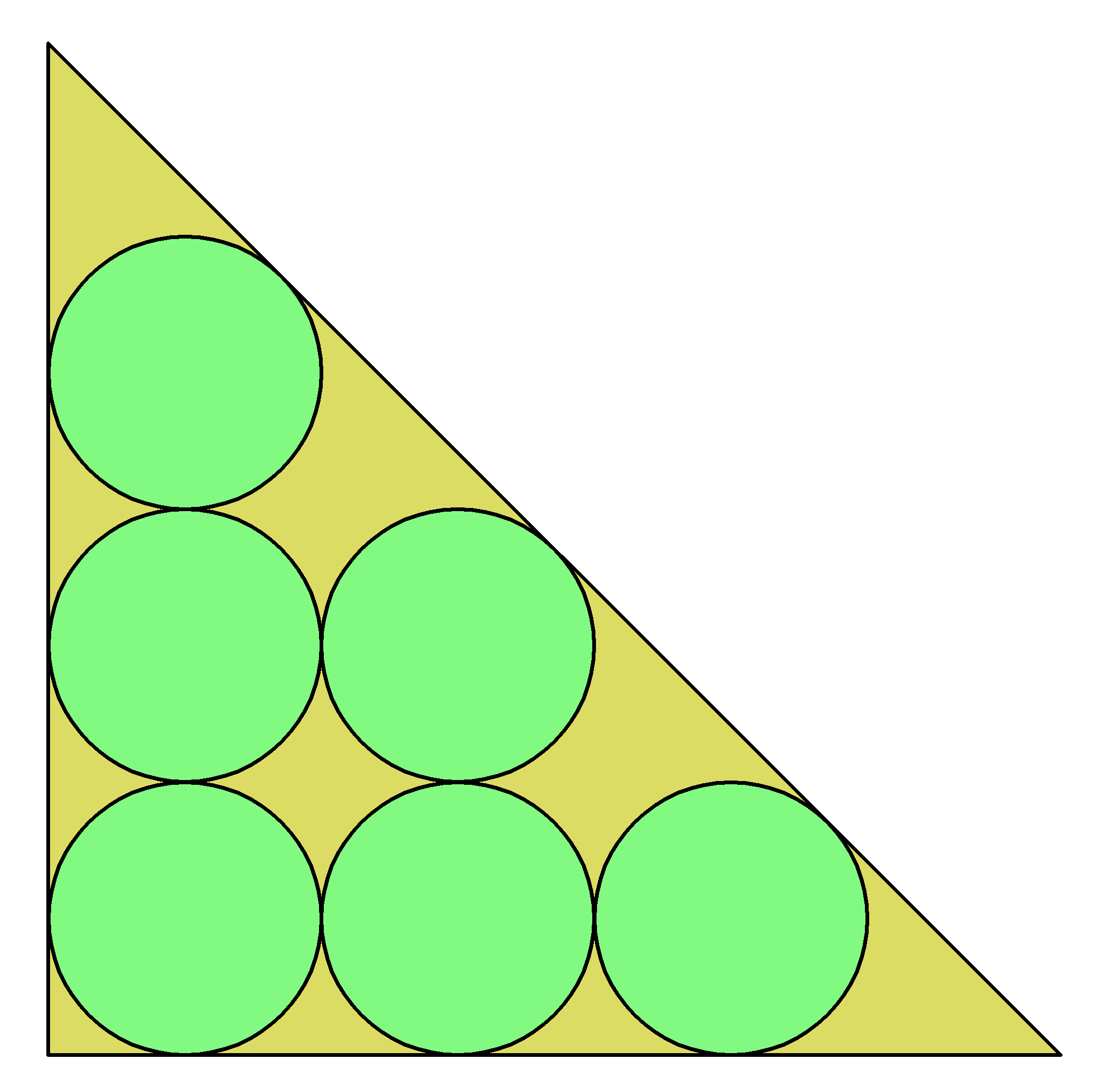 6 cirkloj en 45 45 90 triangulo